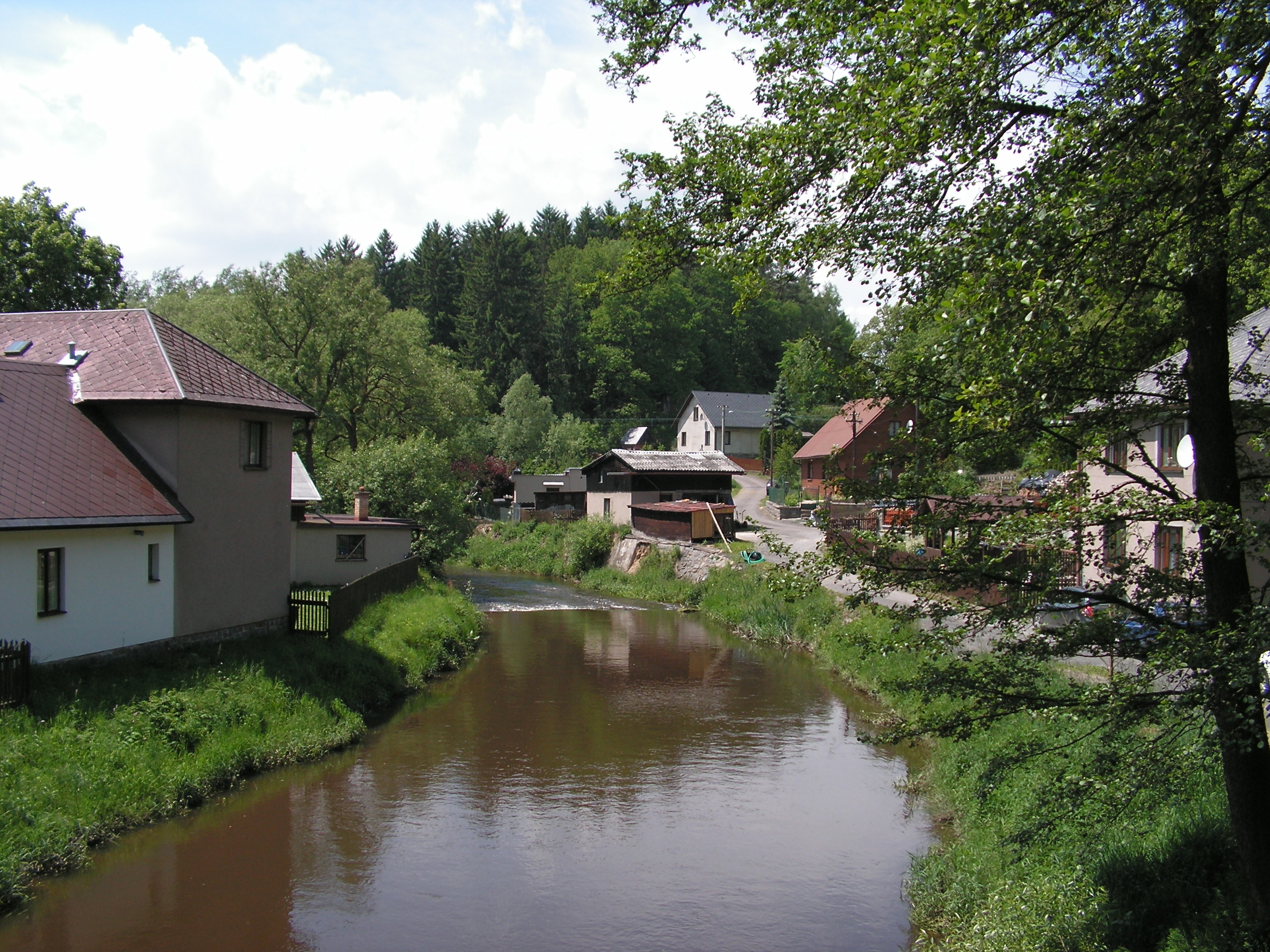 Chrudimka ve Svobodných Hamrech v okrese Chrudim